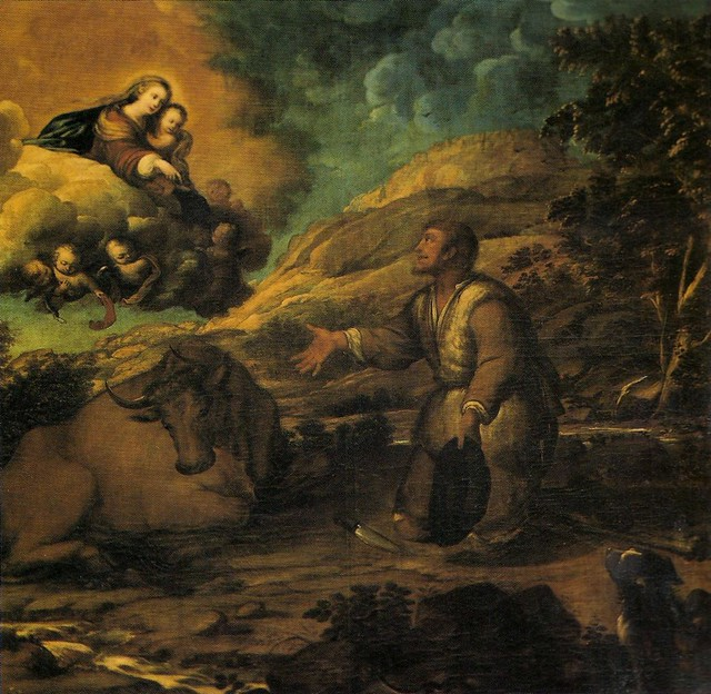 La Virgen de Guadalupe se aparece a Gil Cordero en las Villuercas